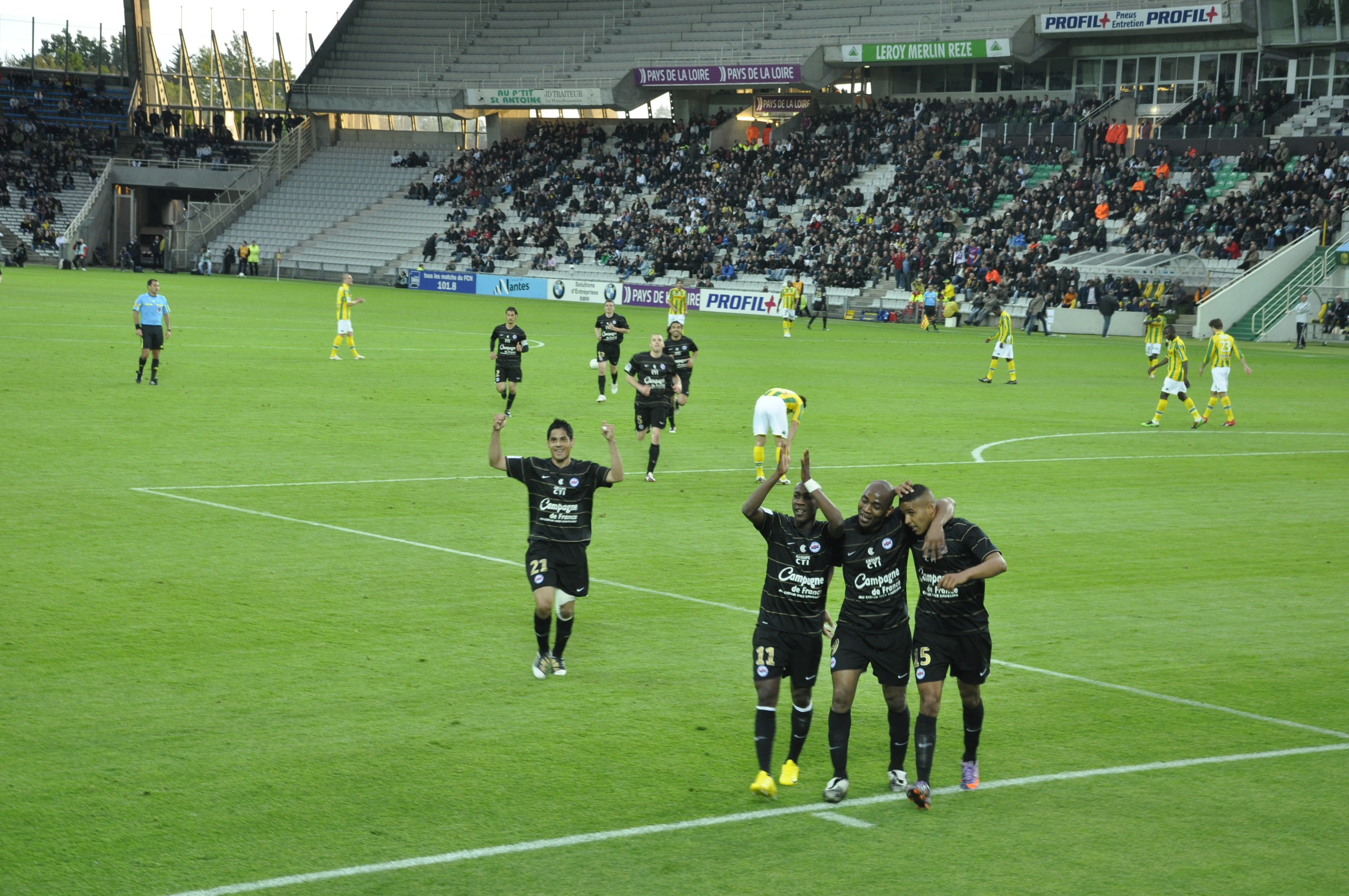 Premier but du stade Malherbe de Caen lors de la dernière journée de championnat face au FC Nantes le 4 mai 2010. From left to right : Pablo Barzola, Steeven Langil, Kandia Traoré and Youssef El-Arabi.